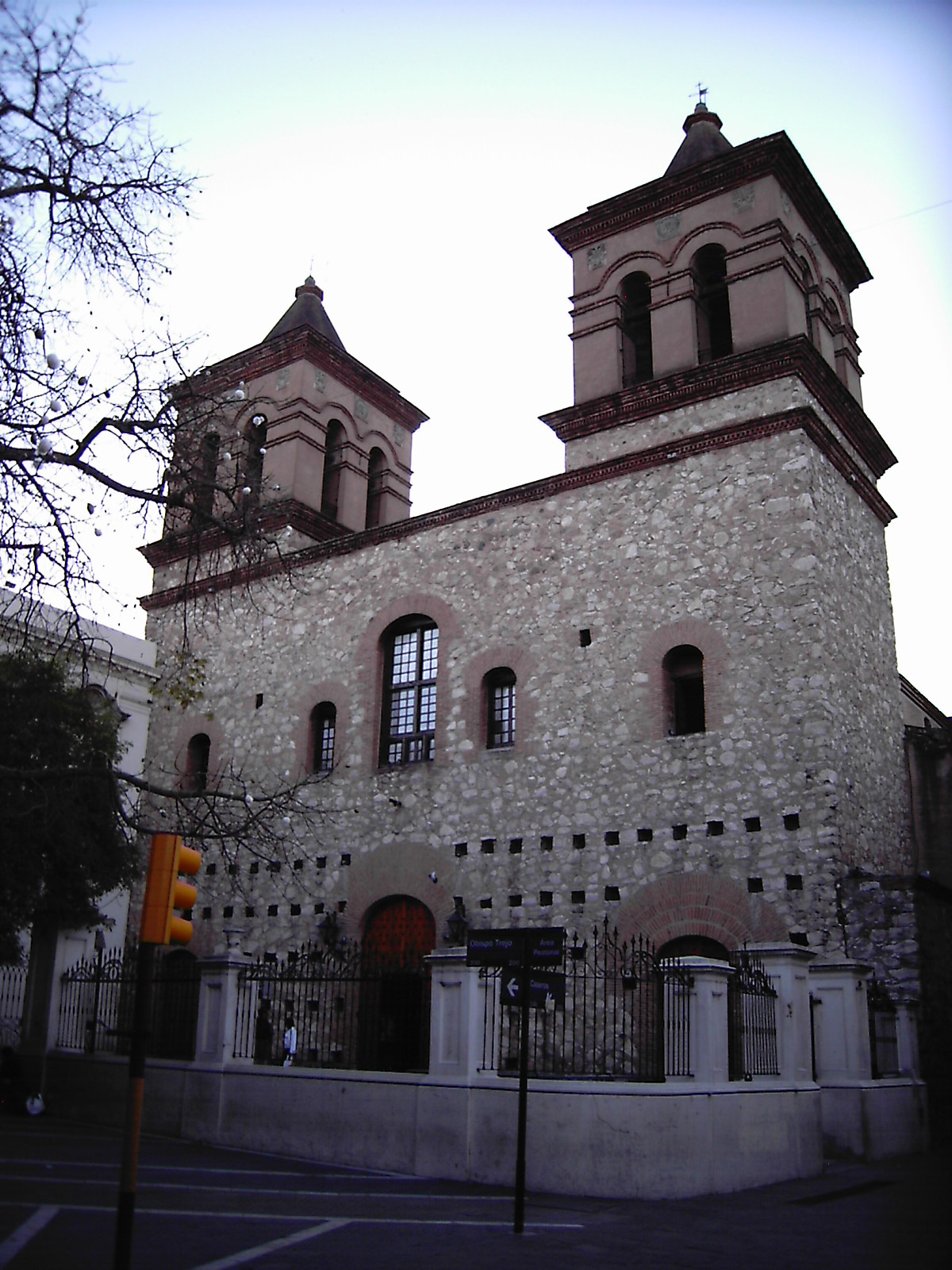 Iglesia Compañia de Jesus, Córdoba, Argentina